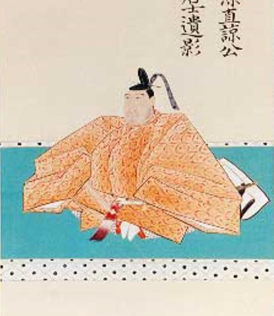 溝口直諒の肖像。